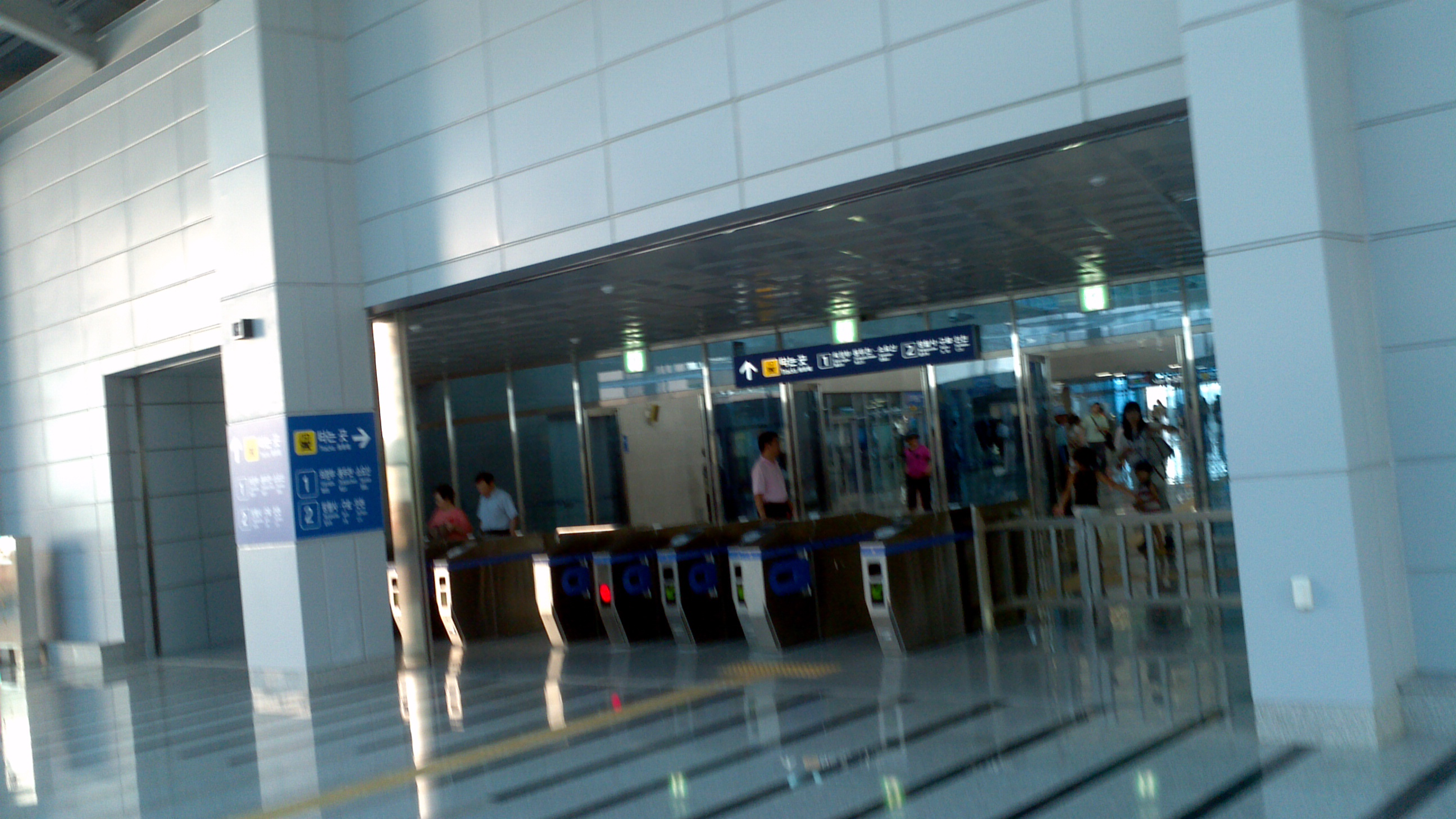 화룡역 환승통로